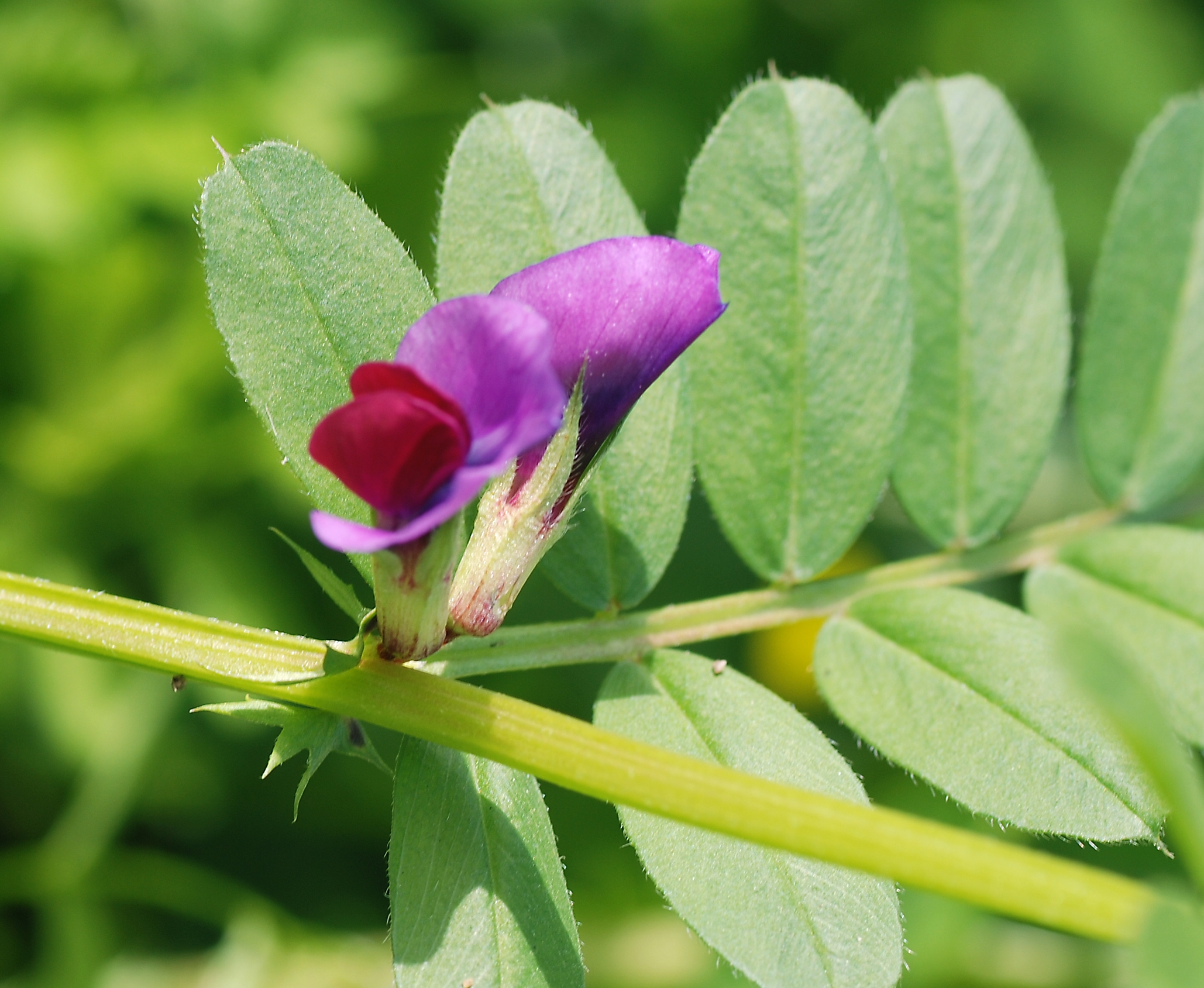 Common Vetch (Vicia sativa)